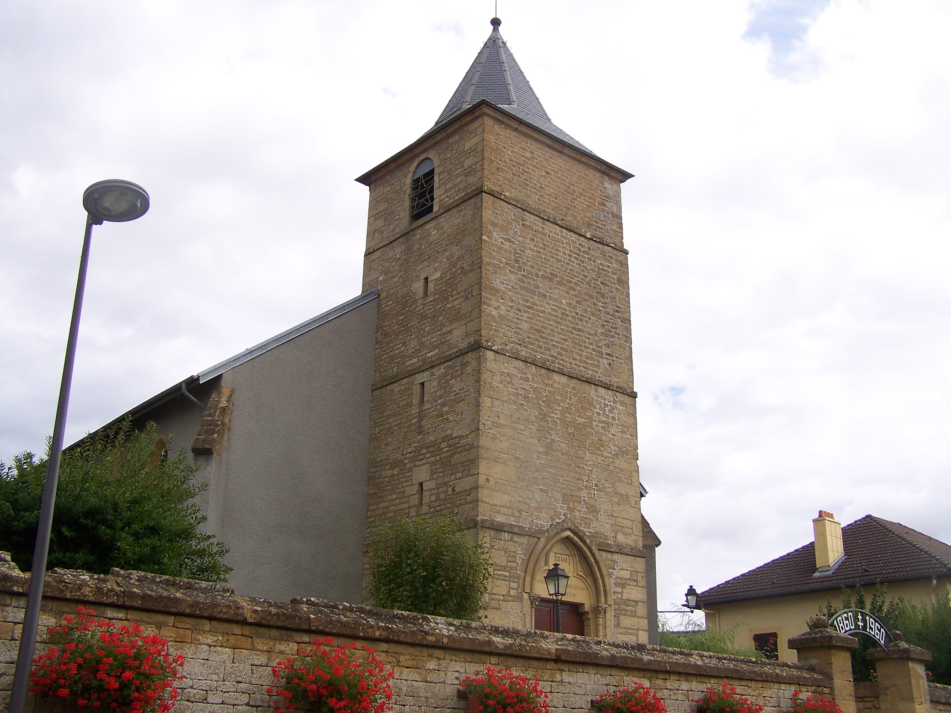 Eglise de Chénières